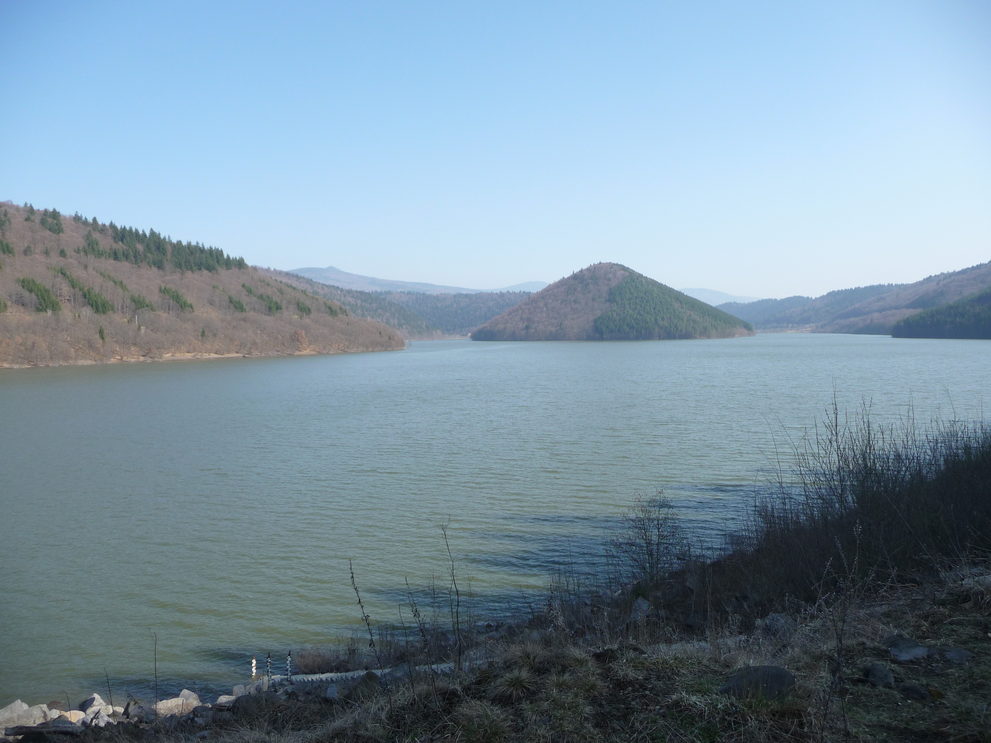 A zetelakai víztározó